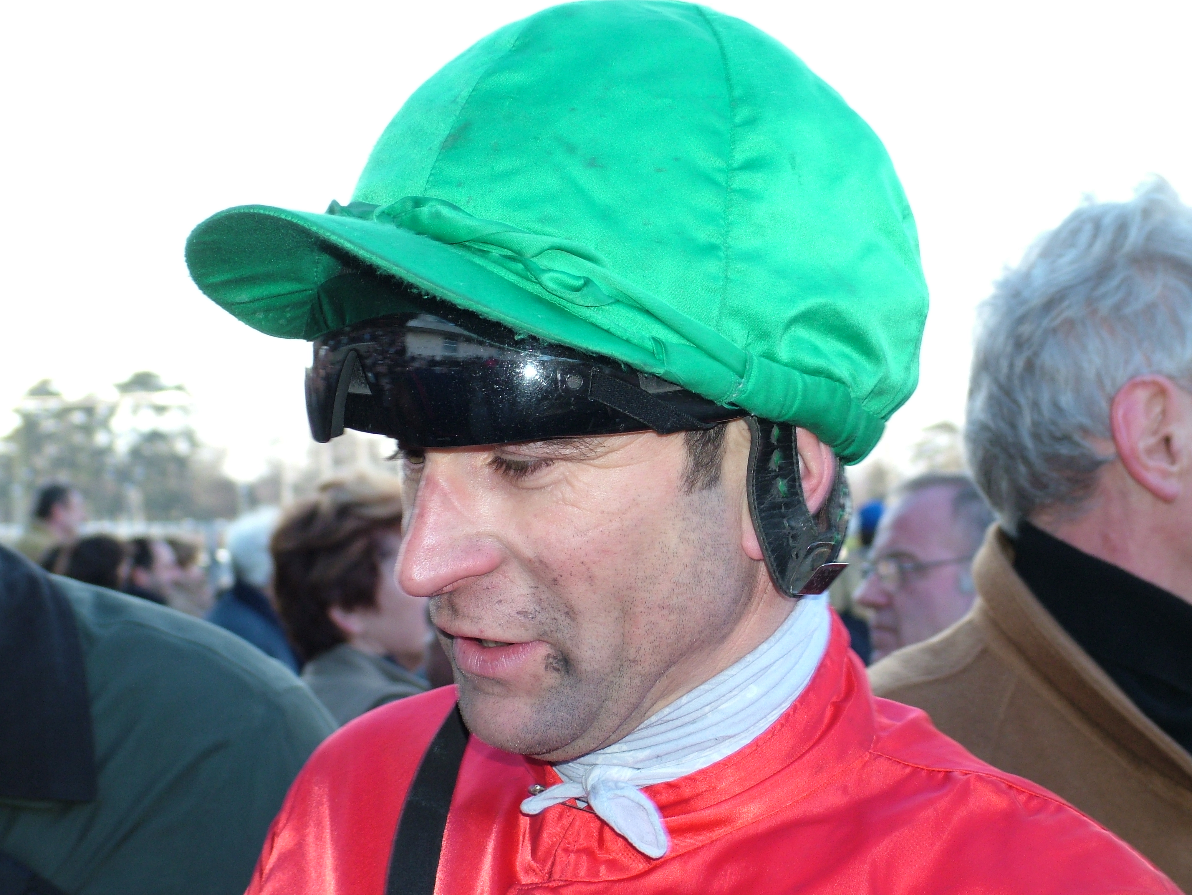 Jean-Michel Bazire, à Vincennes.